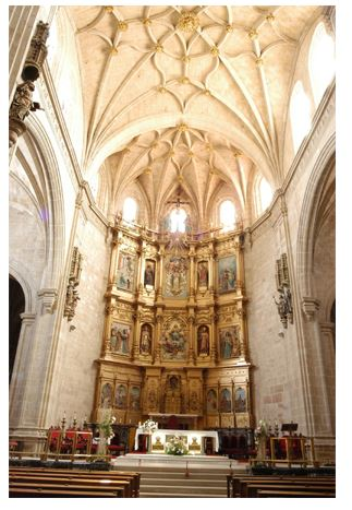 Altar Mayor Catedral de Calahorra